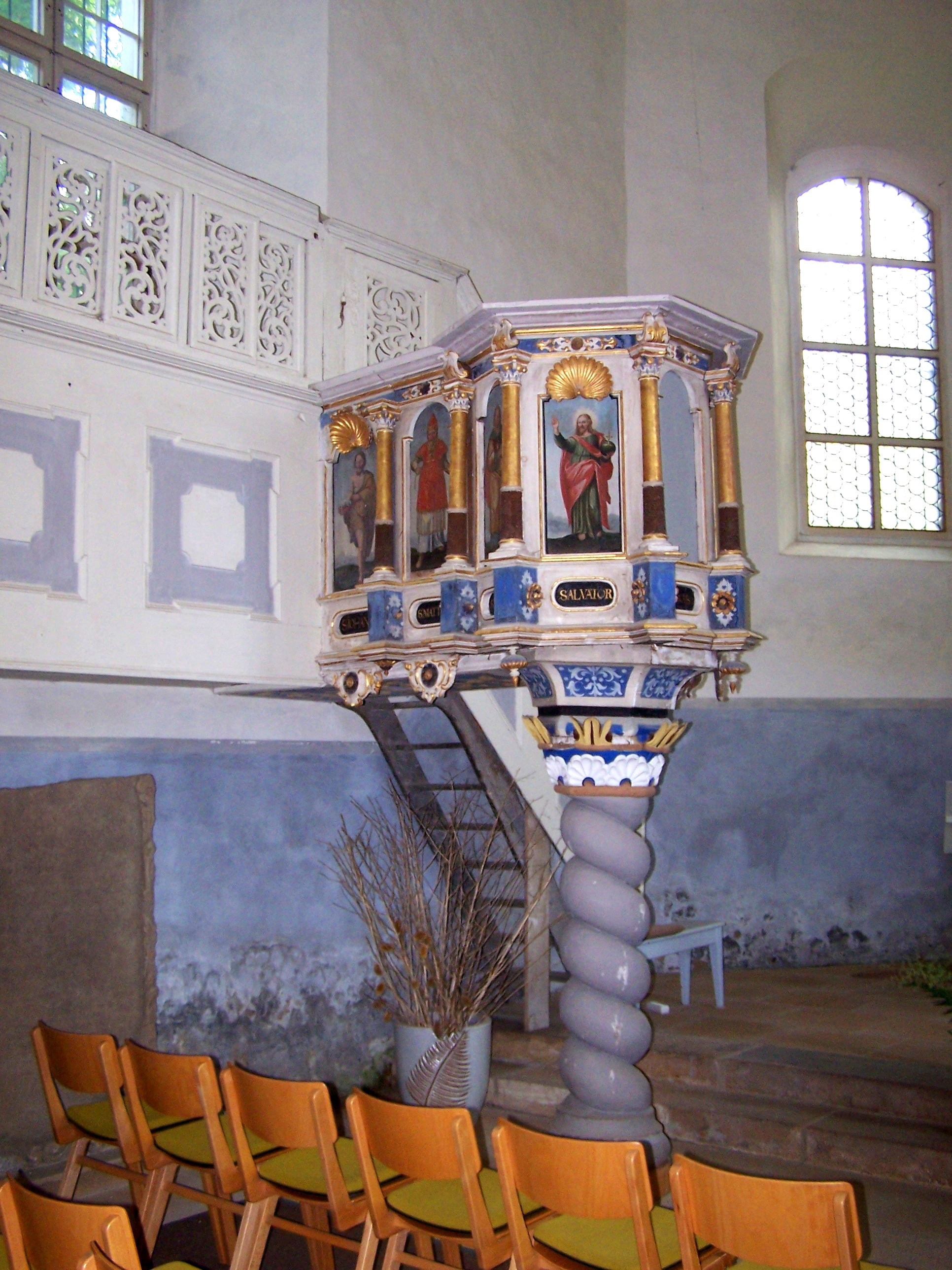 Kanzel in der Urbanskirche in Meißen